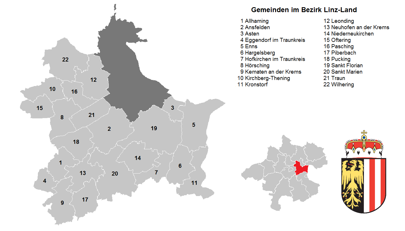 Gemeinden im Bezirk Linz-Land